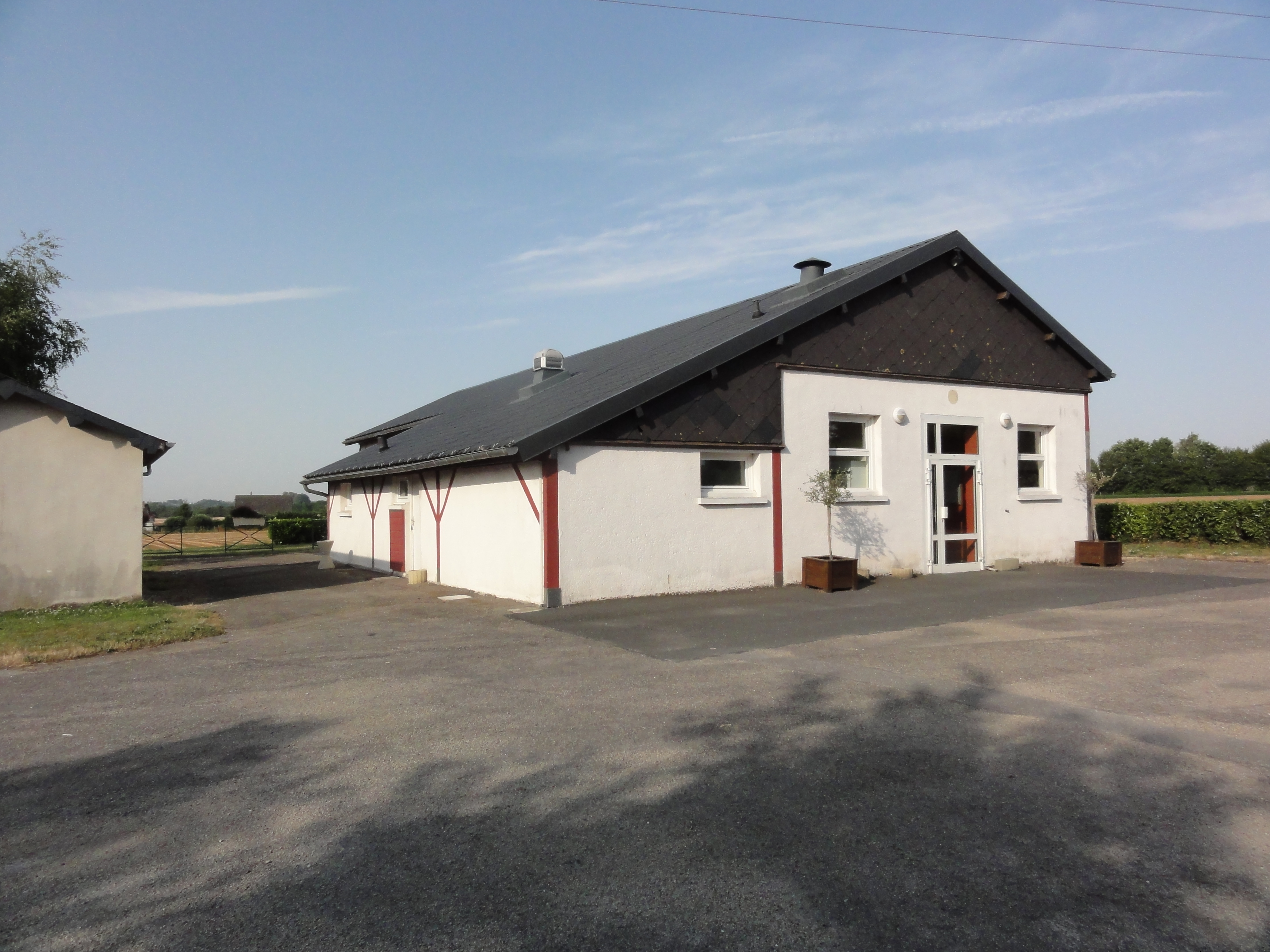 Saint-Aubin-de-Crétot (Seine-Mar.) salle des fêtes